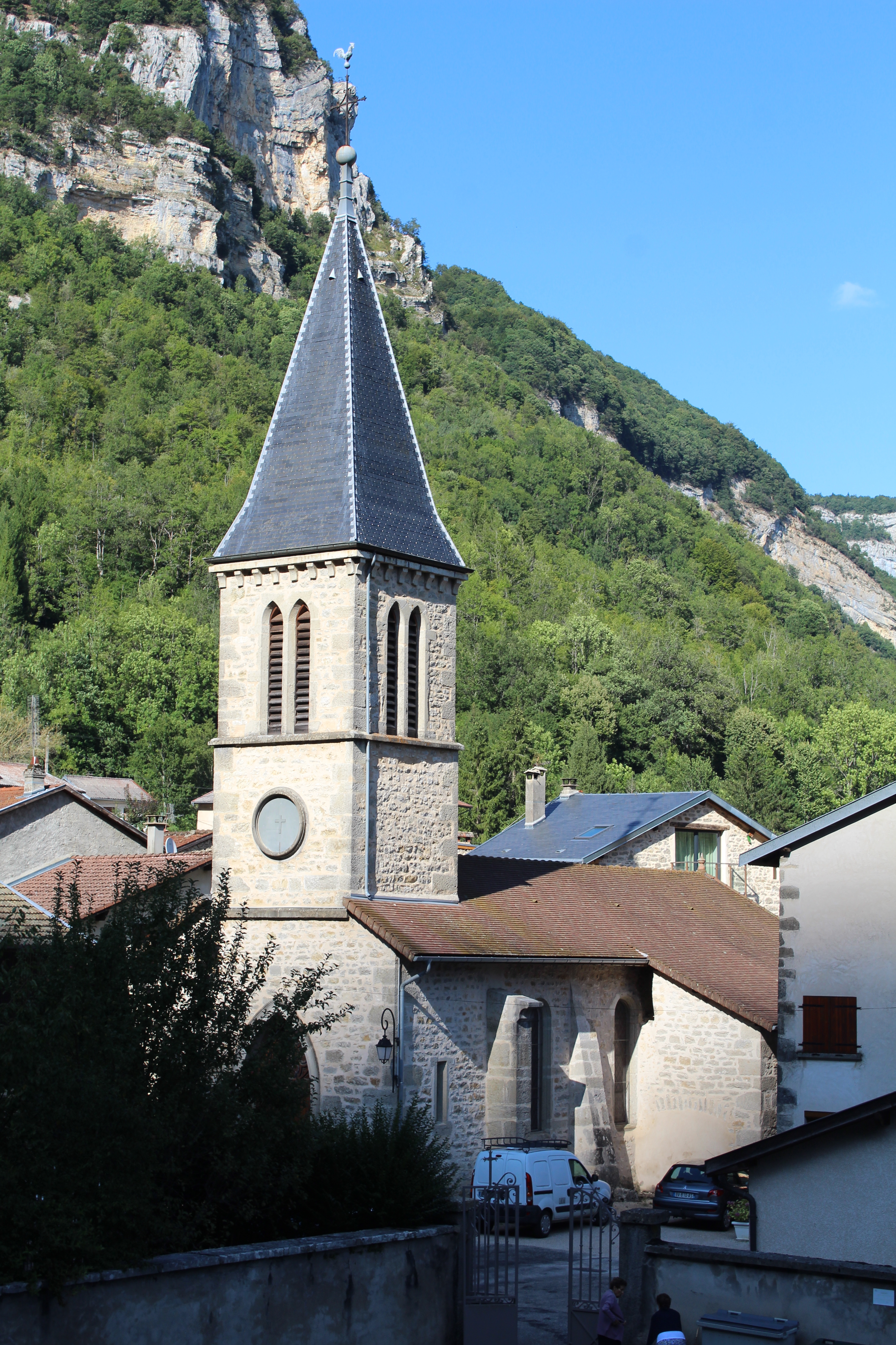 Église de l'Assomption de Chaley.